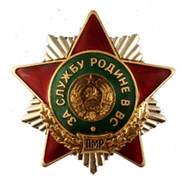 PMR state order